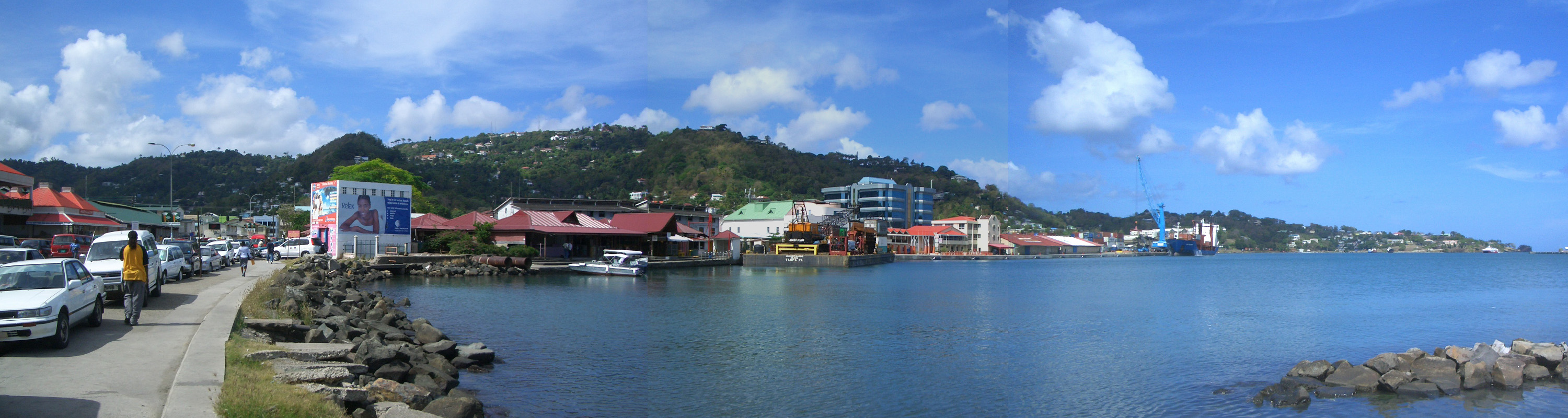 Panoramica de Castries, Santa Lucía